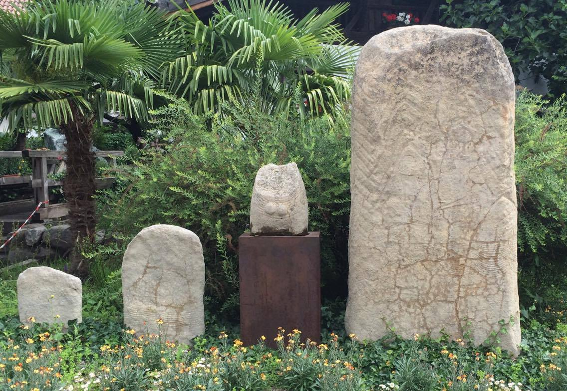 Ein Nachbau der vier Algunder Menhire, welche in Algund vor dem Tourismusbüro platziert sind. Von links nach rechts: Menhir III, Menhir IV, Menhir II und Menhir I.